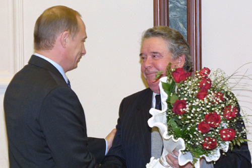 La prezidento Vladimir Putin. La urbo Novij Urengoj, Jamalo-Neneca aŭtonoma distrikto (Rusio).